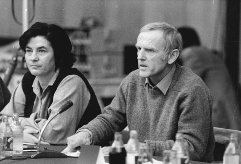 ADN-ZB Senft 29.12.1981 Berlin: An der "Berliner Begegnung zur Friedensförderung" von Schriftsteller, Künstlern und Wissenschaftlern, aus europäischen Ländern vom 13. bis 14. Dezember 1981, nahmen Christa Wolf und Günter de Bruyn (r.) teil.